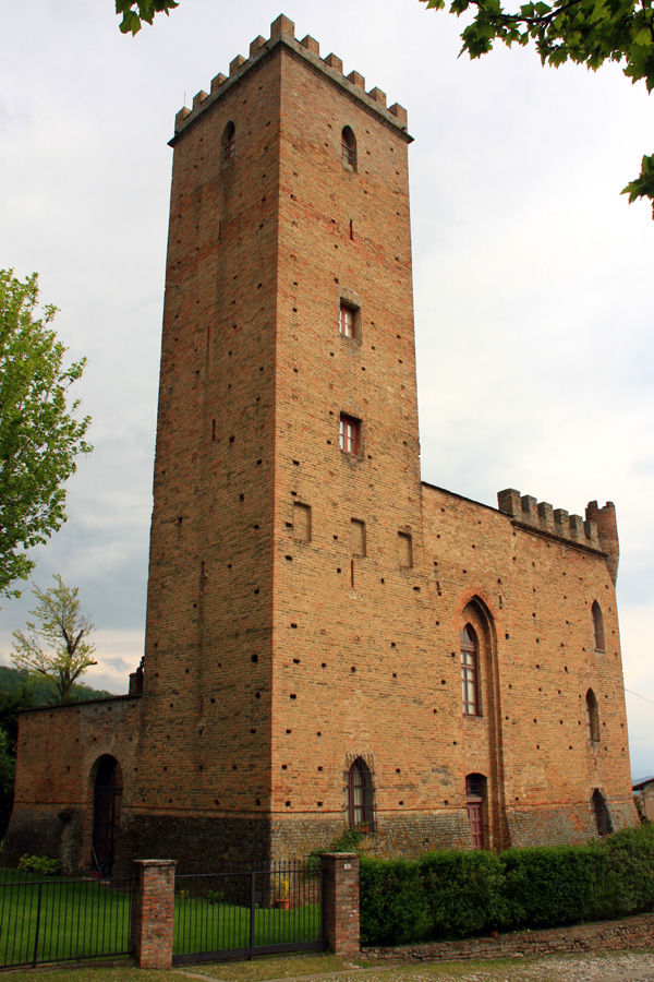 Castello dei Malaspina di Nazzano, frazione di Rivanazzano Terme (PV)